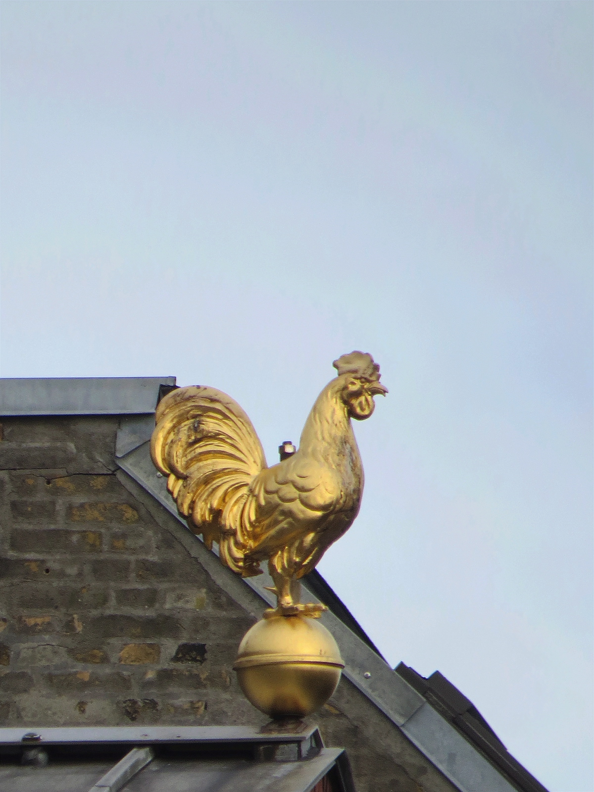 Gylden hane på Krebss Skoles tag, København